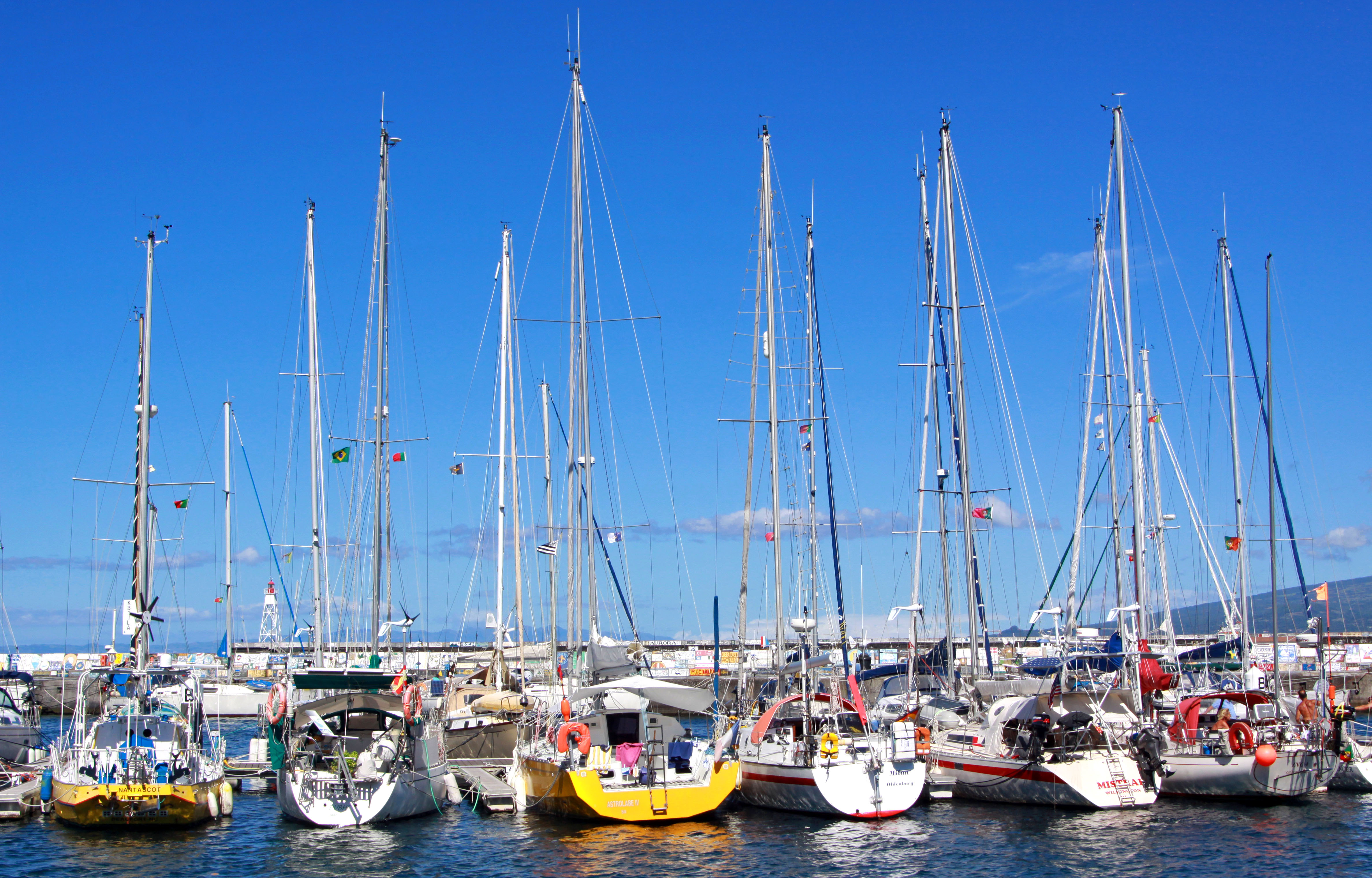 Ilha do Faial, Açores. Sur le port d'Horta.